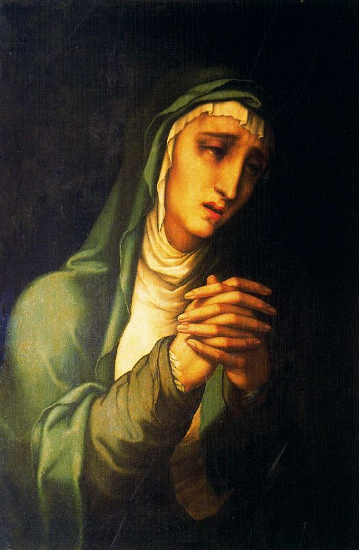 La obra representa a la Virgen María en actitud dolorosa.